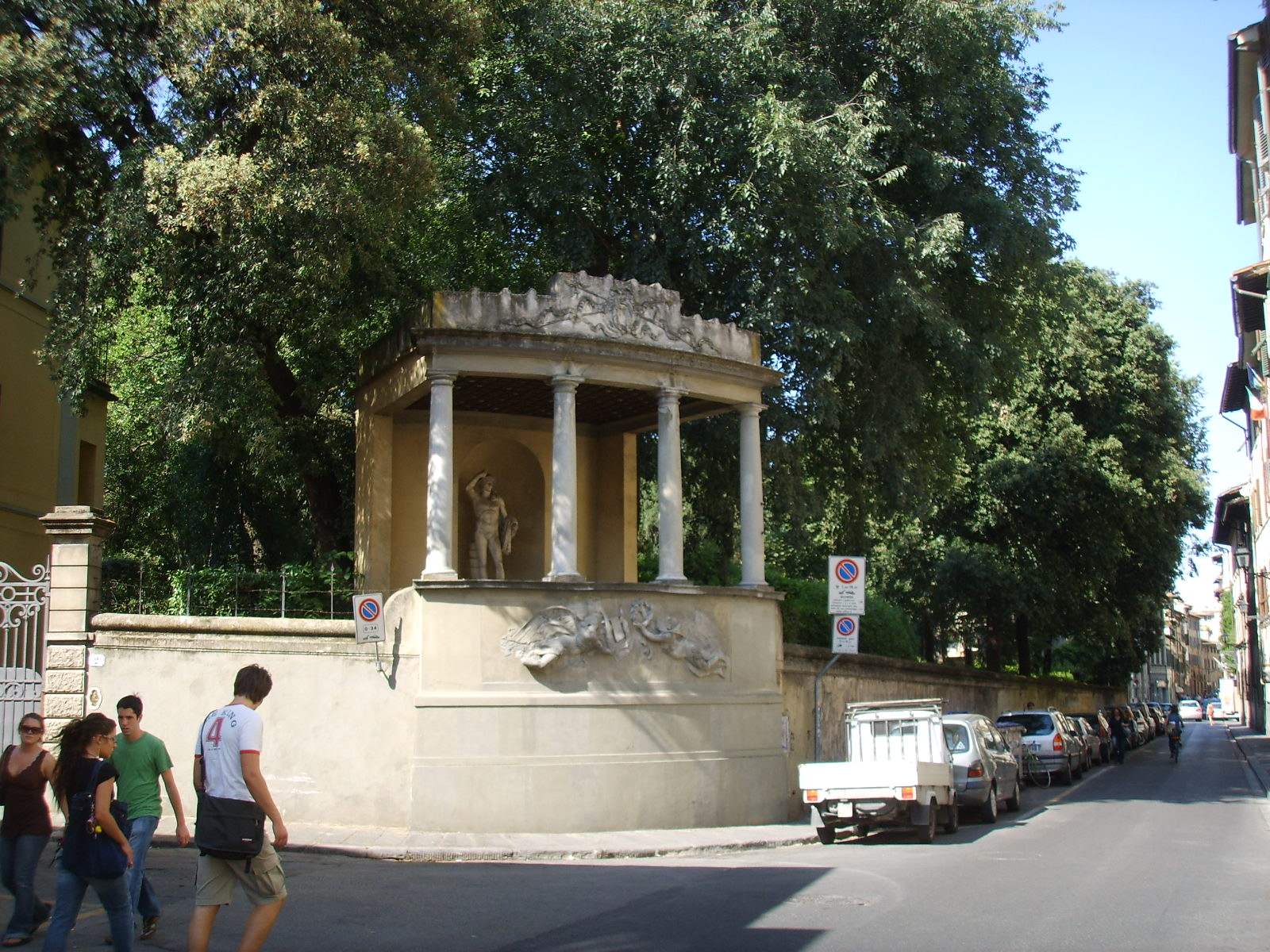 Giardino corsi annalena, garden in Florence, Italy